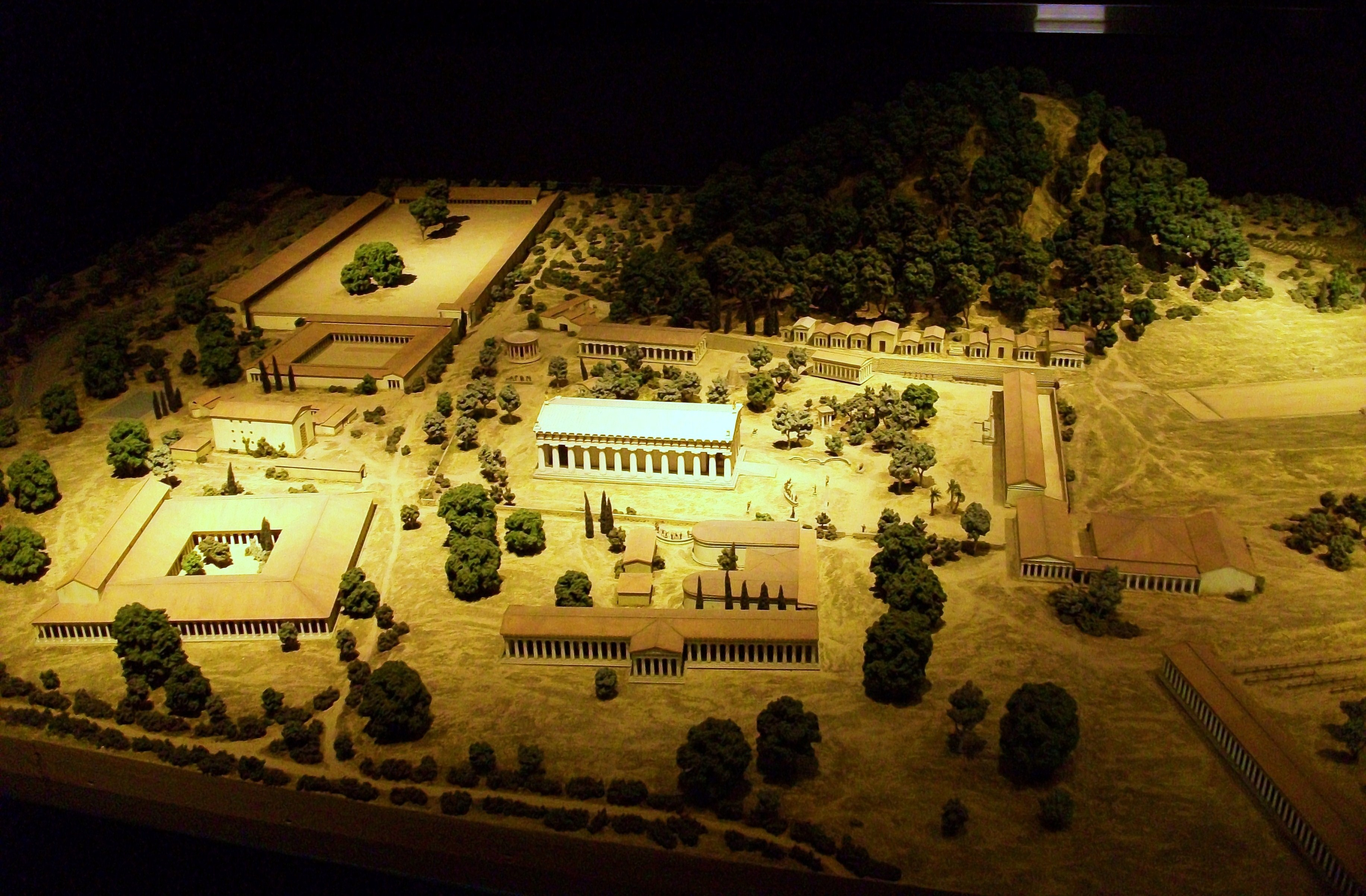 Maqueta del recinte del santuari d'Olímpia, a Grècia. Exposició La bellesa del cos, al Museu Arqueològic d'Alacant. Forma part de l'exposició permanent del Museu Britànic.